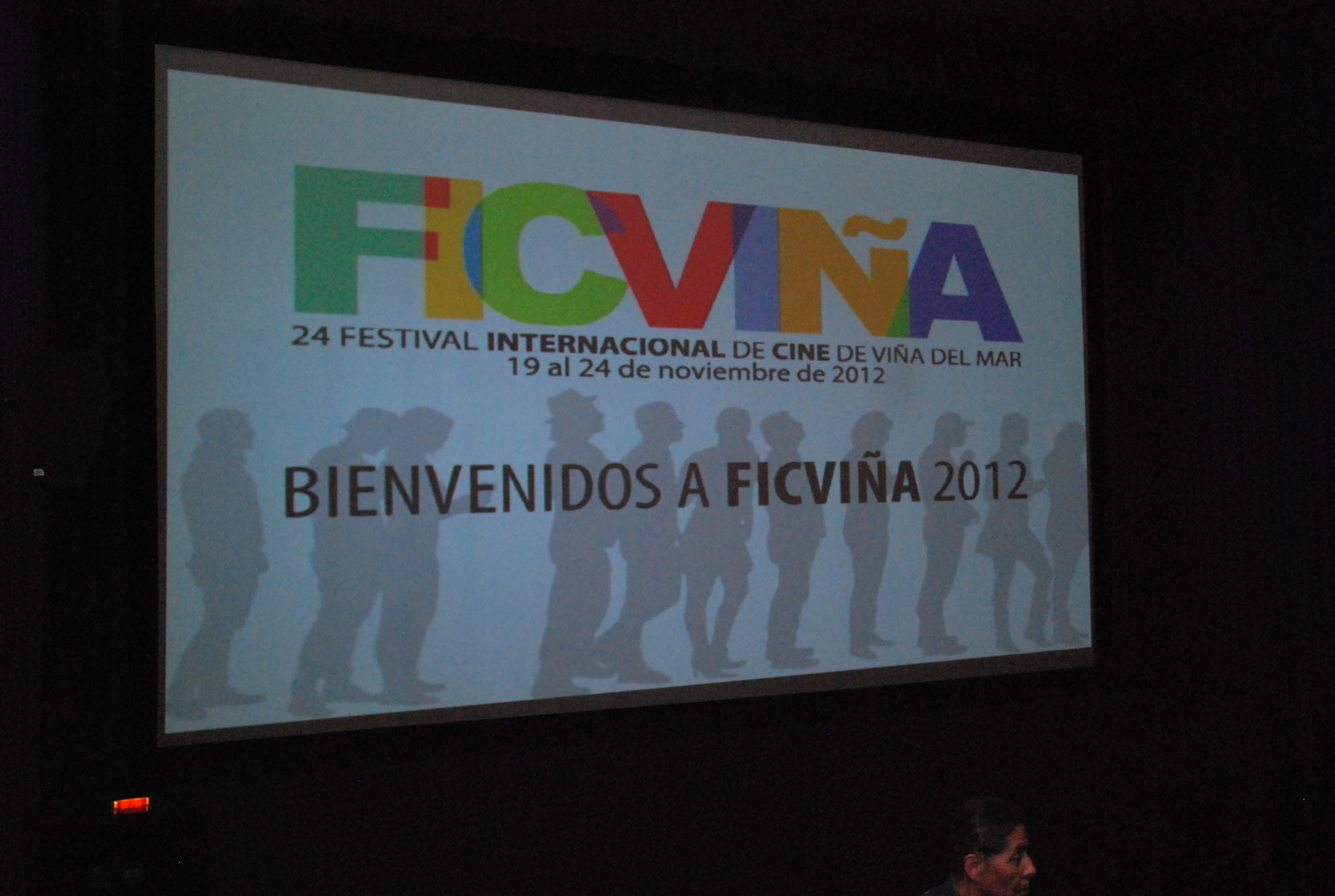 Inauguración FICVIÑA 2012.